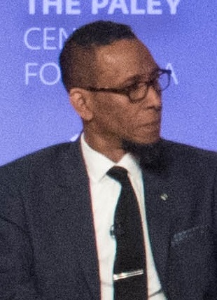 Actor Ron Cephas Jones promoting This is us at the 2017 paleyfest